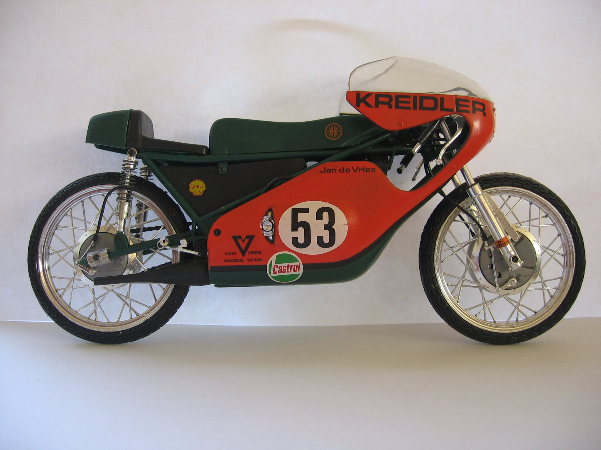 Mooi model van een Kreidler